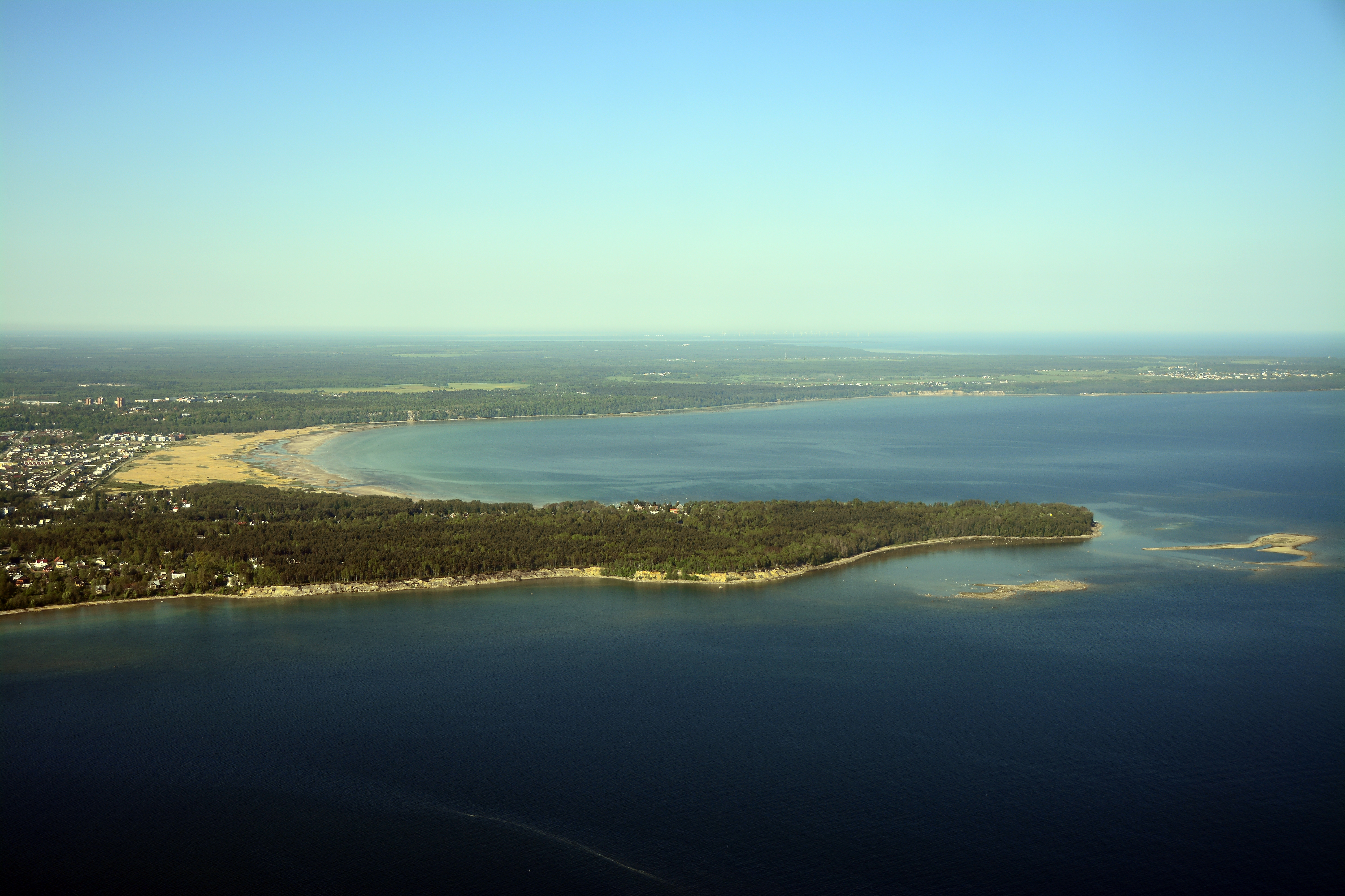 Õhuvaade Kakumäe neemest